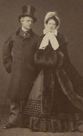 Супруги Броэ - Луи Огнюст и Мария (Теодоровна), рожд. де Лагрене.